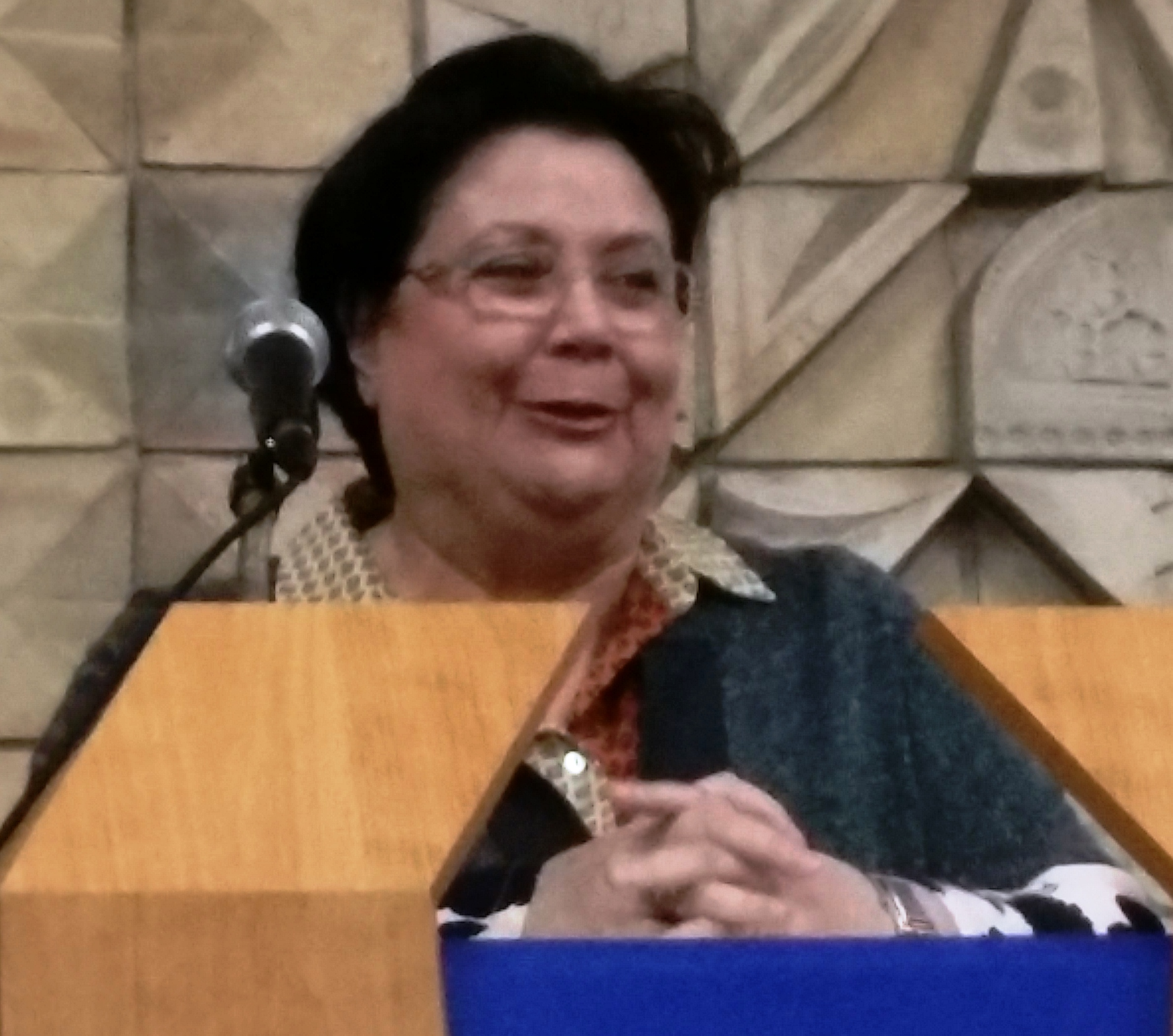 ההיסטוריונית פרופסור מינה רוזן